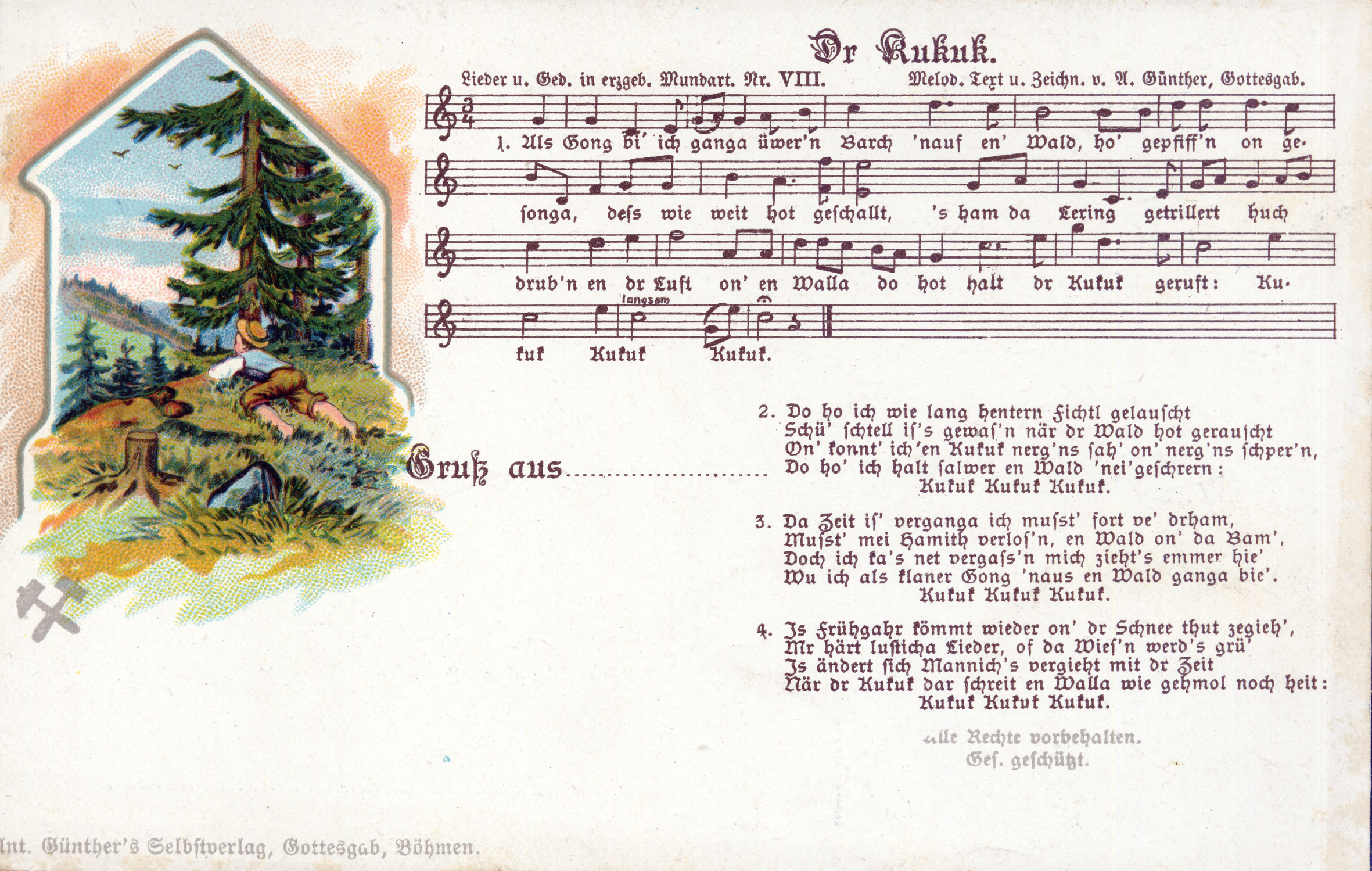 Nr. VIII Dr Kukuk - 1904